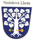 znak obce Nedašova Lhota